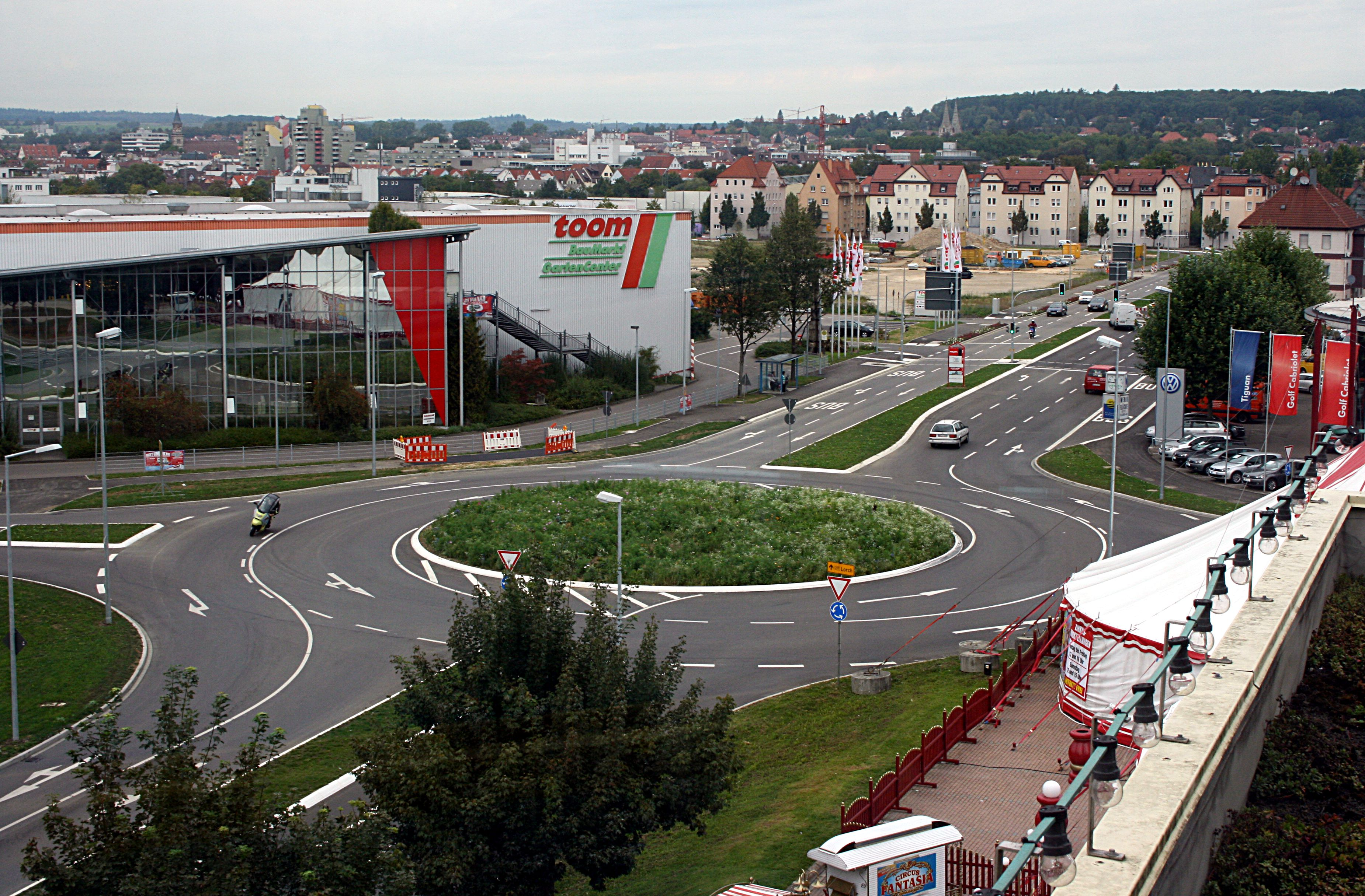 Turbokreisverkehr Heininger Straße/Holzheimer Straße in Göppingen von Südosten.